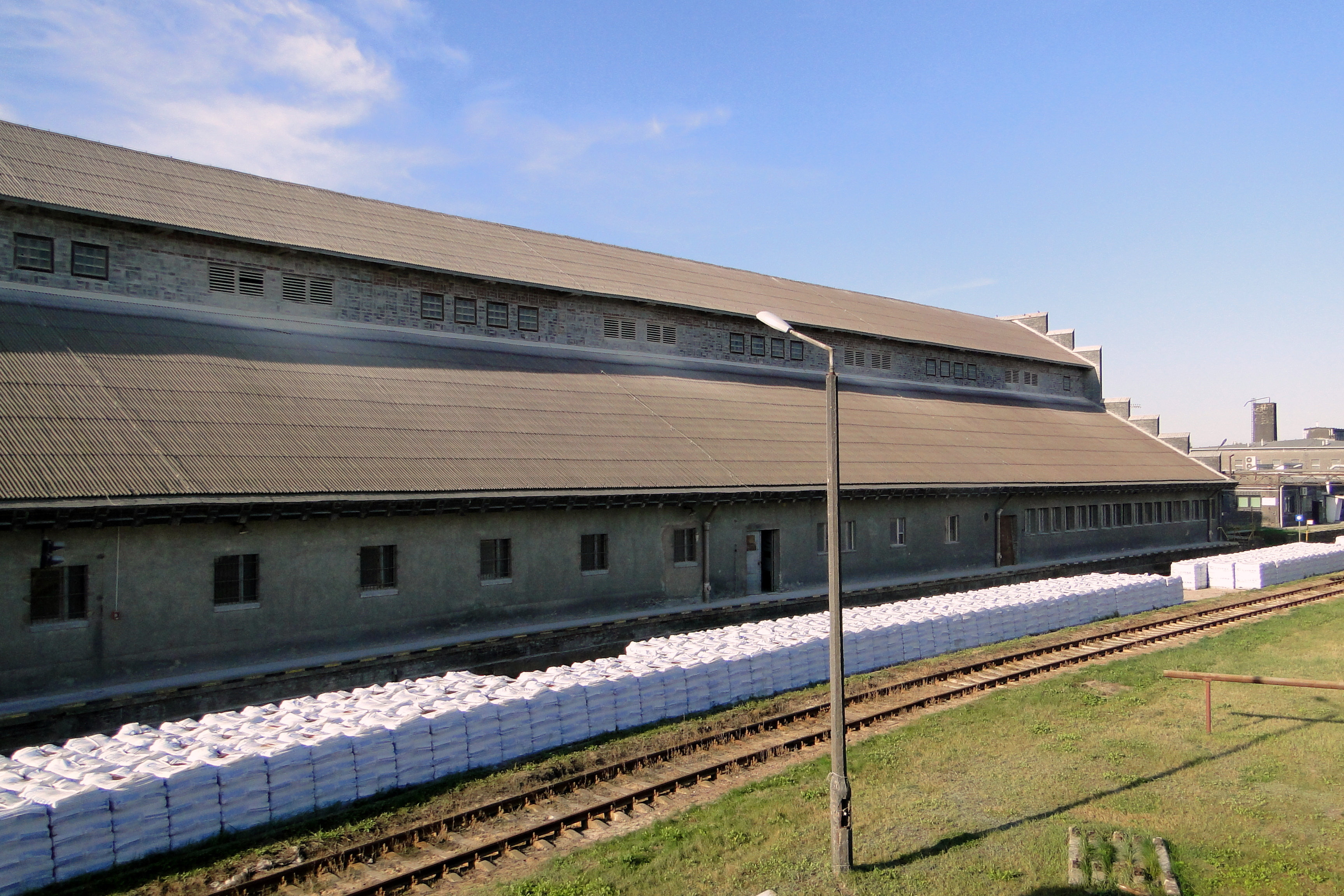 Magazyn superfosfatu – „hala Poelziga”